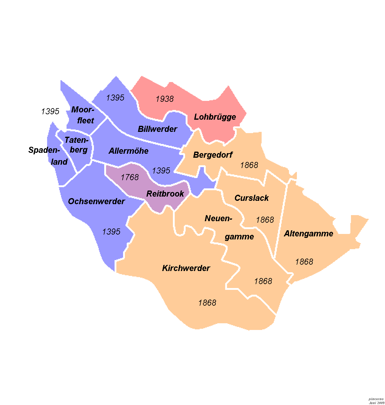 Stadtteile des Bezirks Bergedorf - Zeitpunkt der Zugehörigkeit zu Hamburg: Während die Marschlande bereits 1395 von Hamburg gekauft worden waren, kam Reitbrook erst 1768 zu Hamburg. Die beiderstädtische Verwaltung für Bergedorf und in der Folge für die Vierlande endete 1868. Lohbrügge trat erst im Rahmen des Groß-Hamburg-Gesetzes 1938 dem Hamburger Staatsgebiet bei.